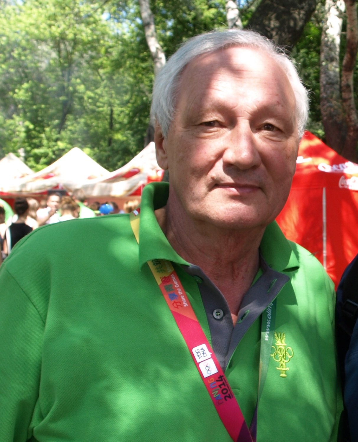 Michał Butkiewicz